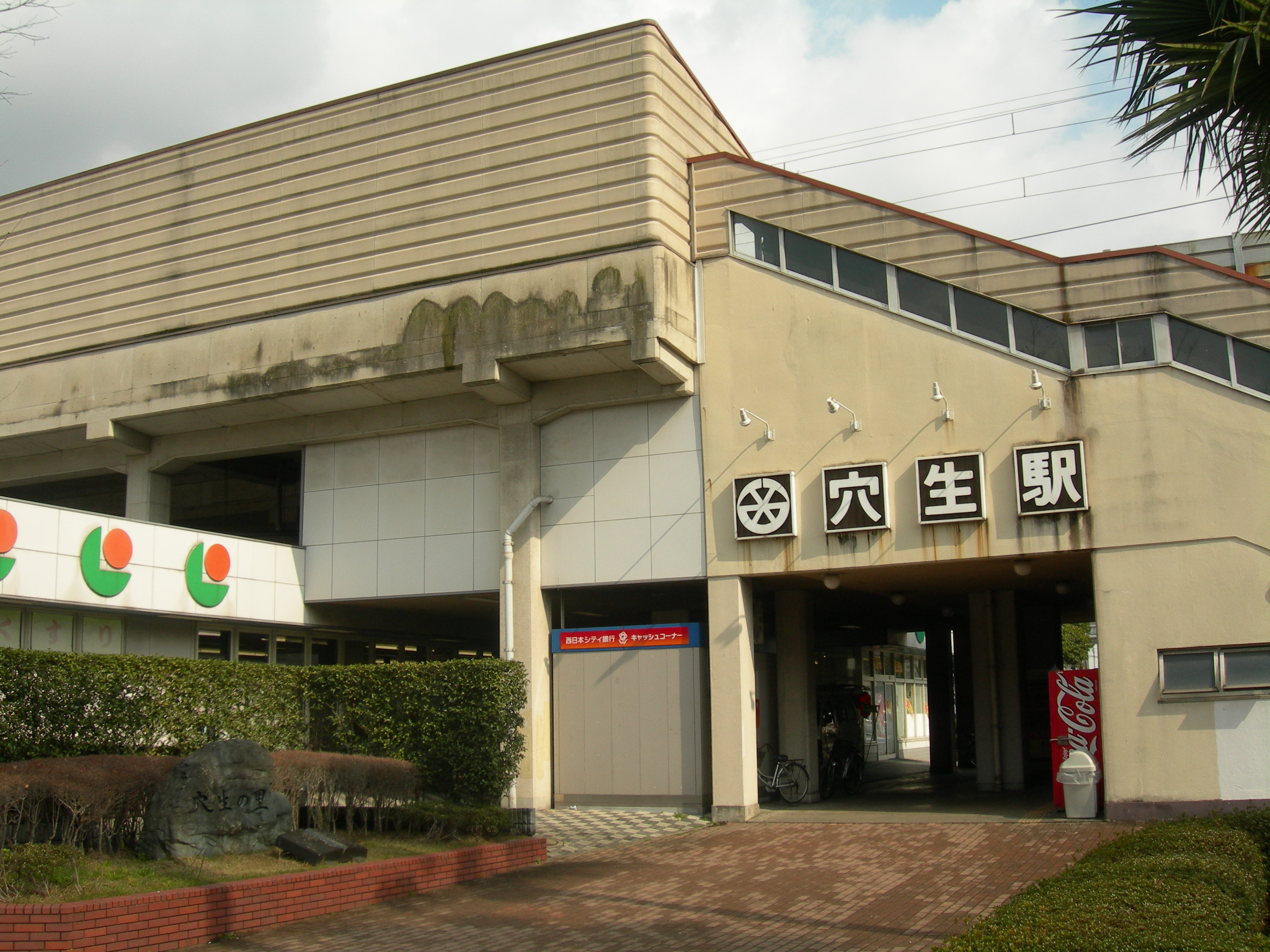 穴生駅